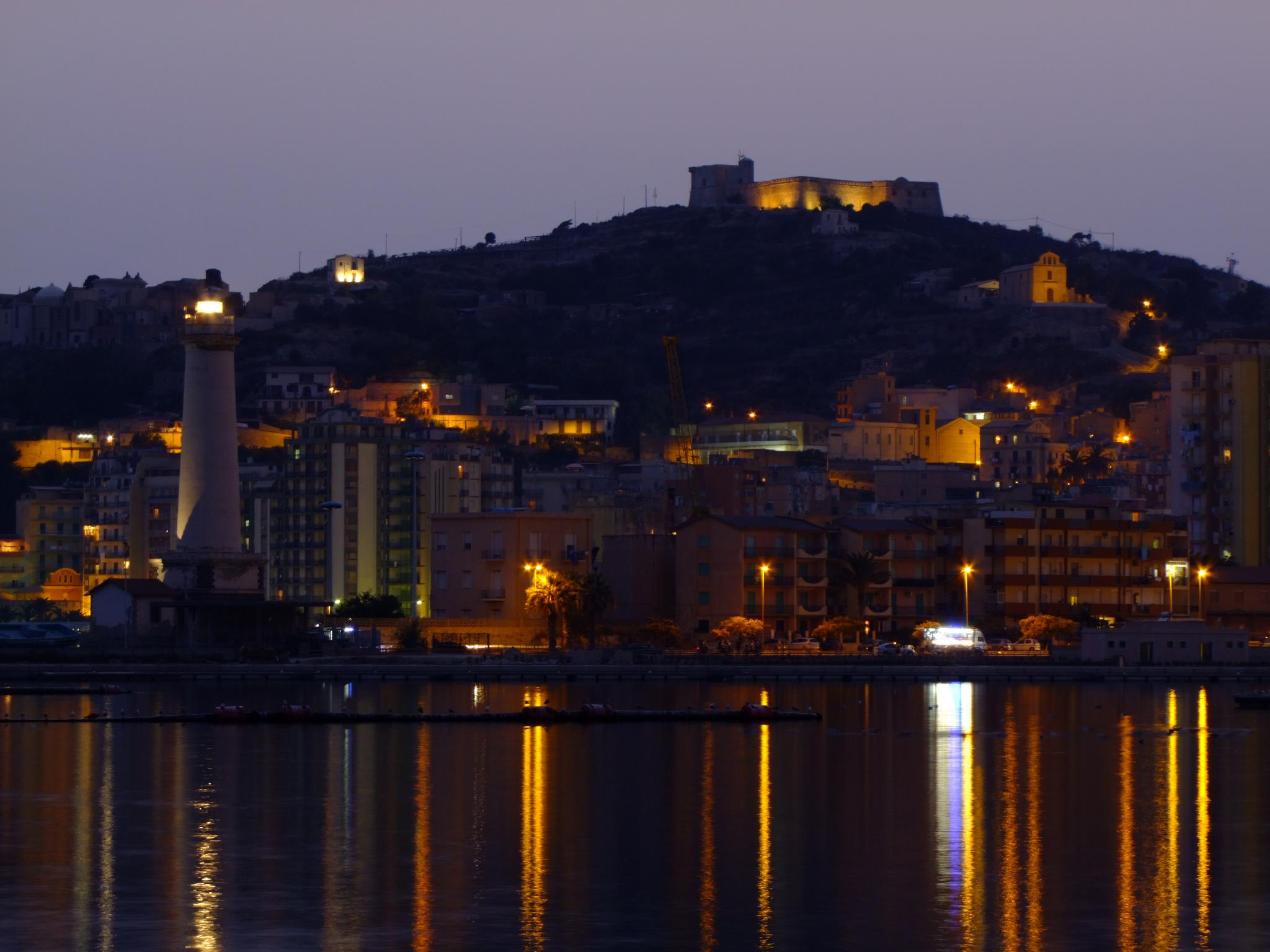 Panorama Licata